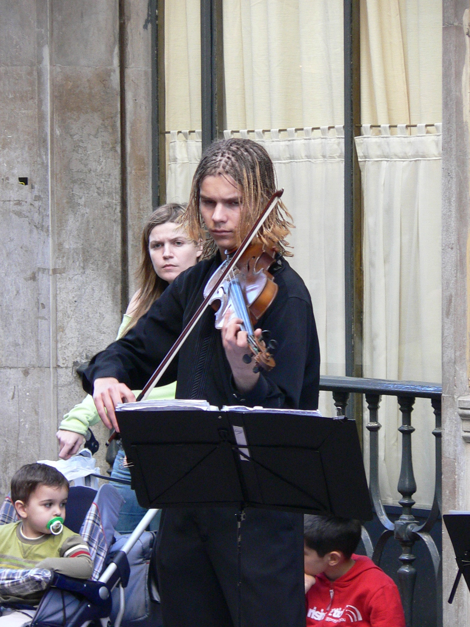 Joven estudiante violonista. Foto personal de Mario Scolas. La fotografia es de mi propia producción, (mi propio crédito documental) - Dejo todos los derechos legales...